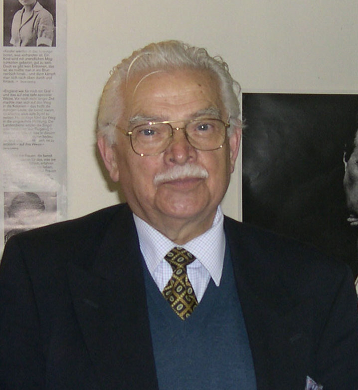 Portrait Henri Adamczewki le jour de ses 75 ans